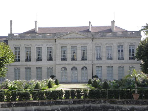 Préfecture de la Marne (51).